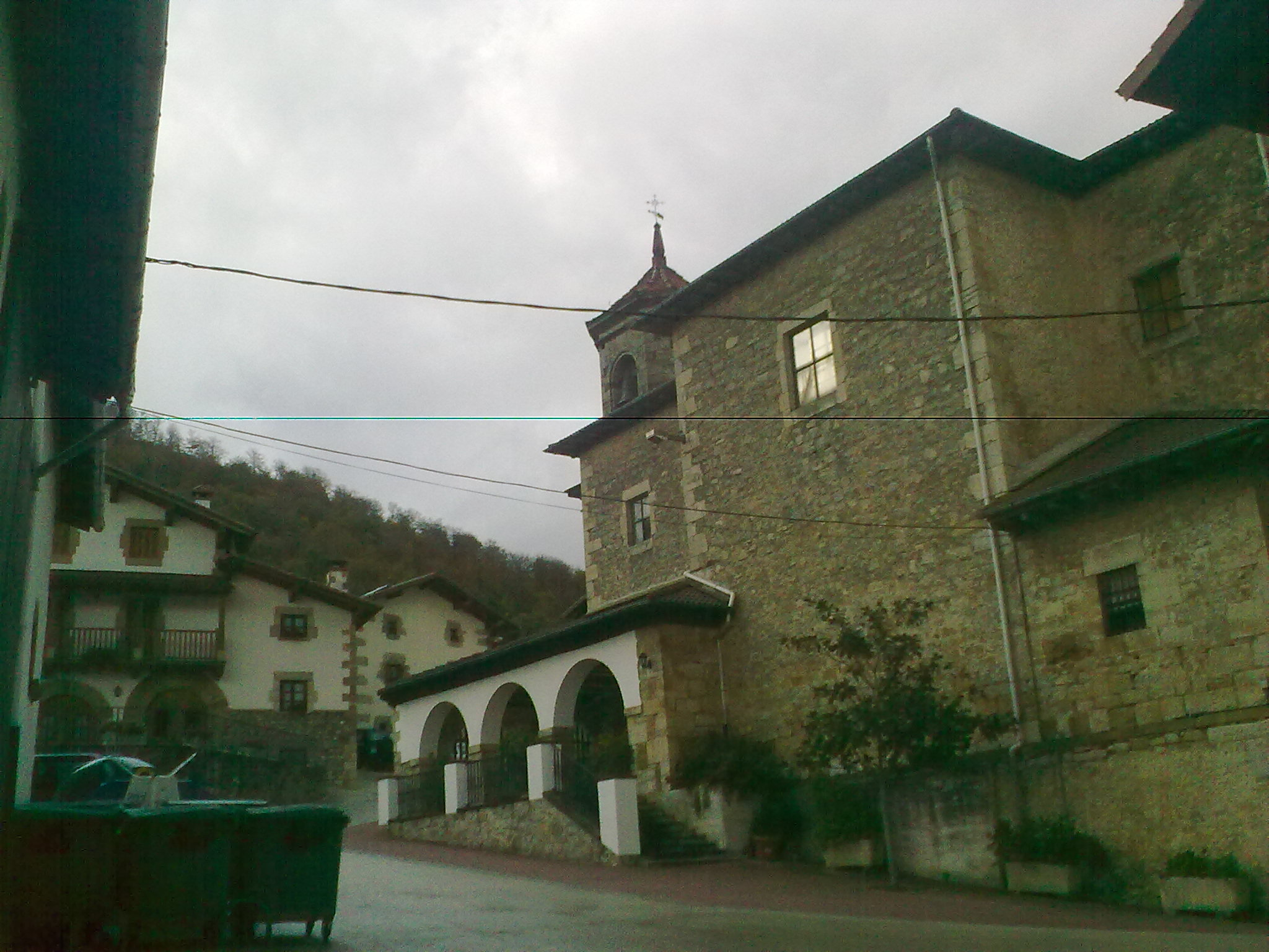 Ultzama